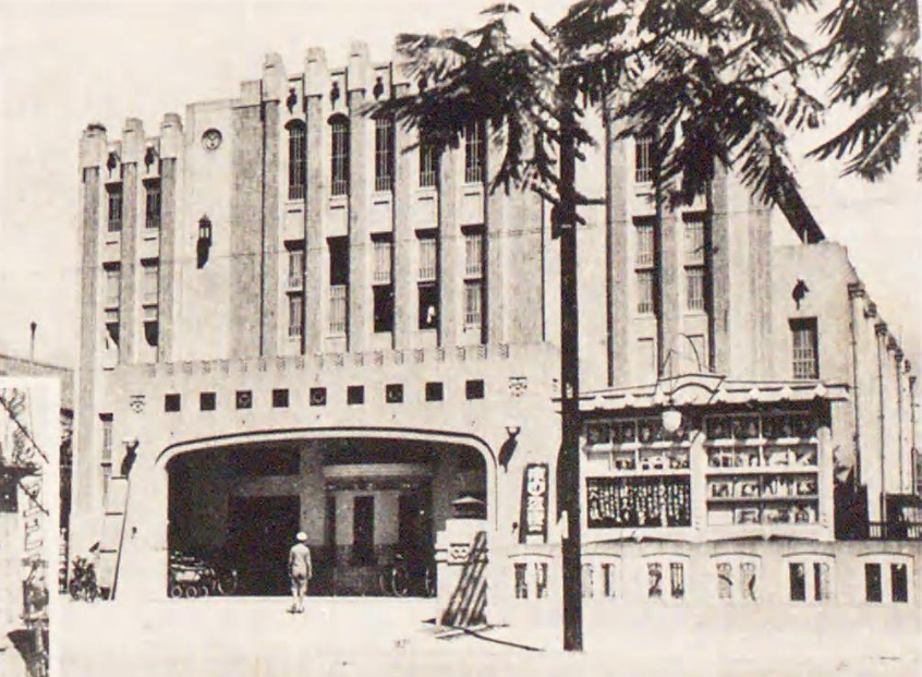 中文（台灣）: 戰後改為成功大戲院